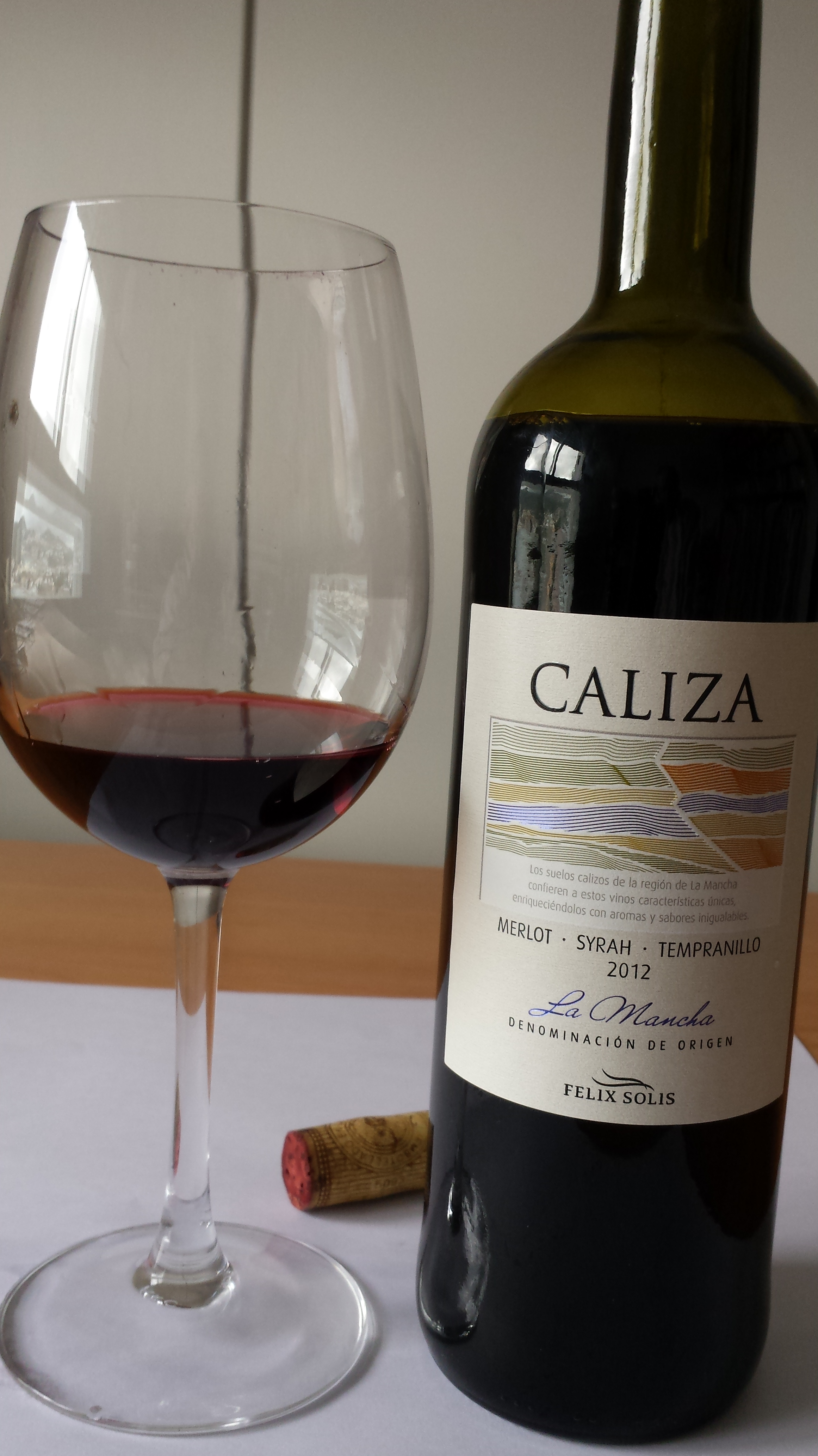 Vino DO La Mancha, merlot , syrah y tempranillo. Castilla la Mancha, España.